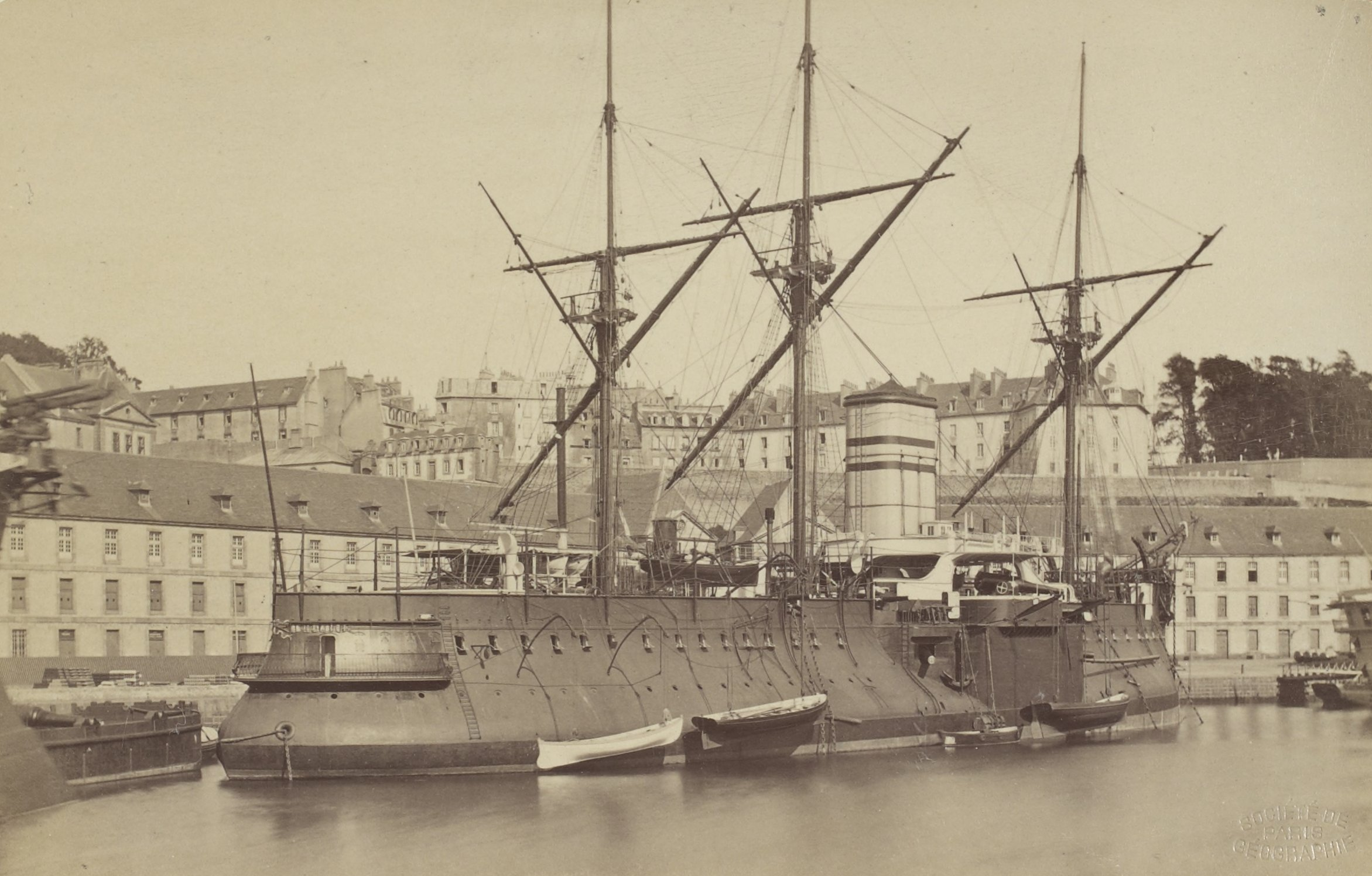 Port militaire de Brest, croiseur cuirassé de 1ére classe (le Redoutable)